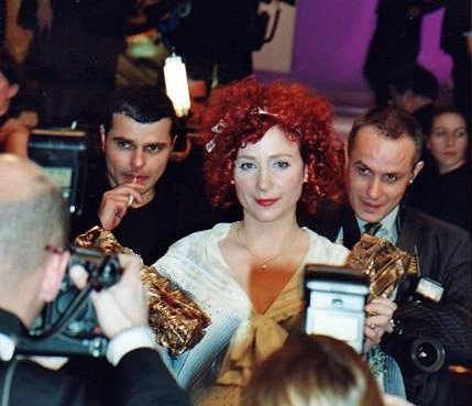 Julie Depardieu à la cérémonie des Césars.